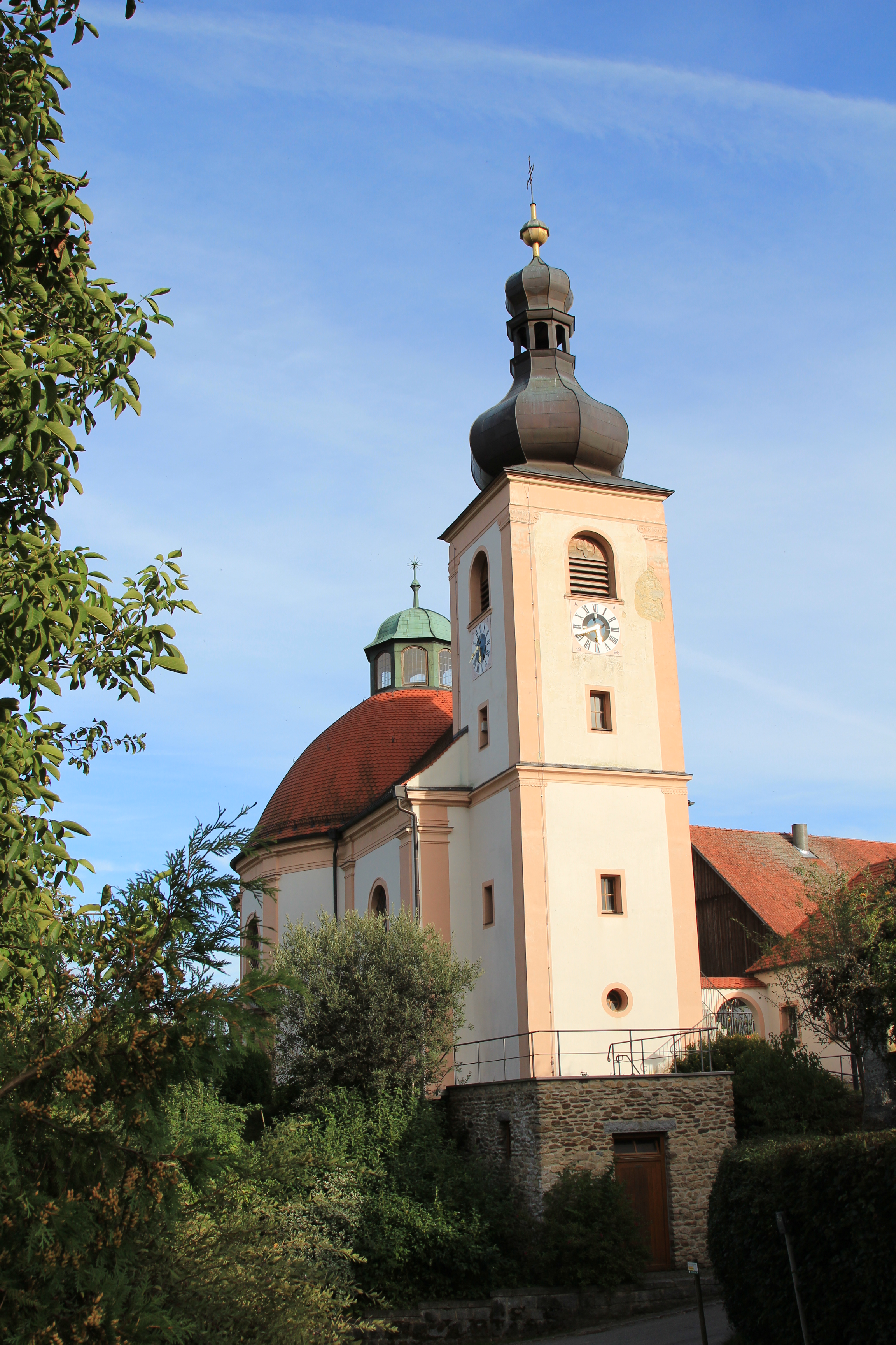 Katzdorf, Neunburg vorm Wald, Landkreis Schwandorf, Oberpfalz, Bayern; Die barocke Wallfahrtskirche Mater Dolorosa in Katzdorf gehört zu den ältesten Marienwallfahrten des Bistums Regensburg.